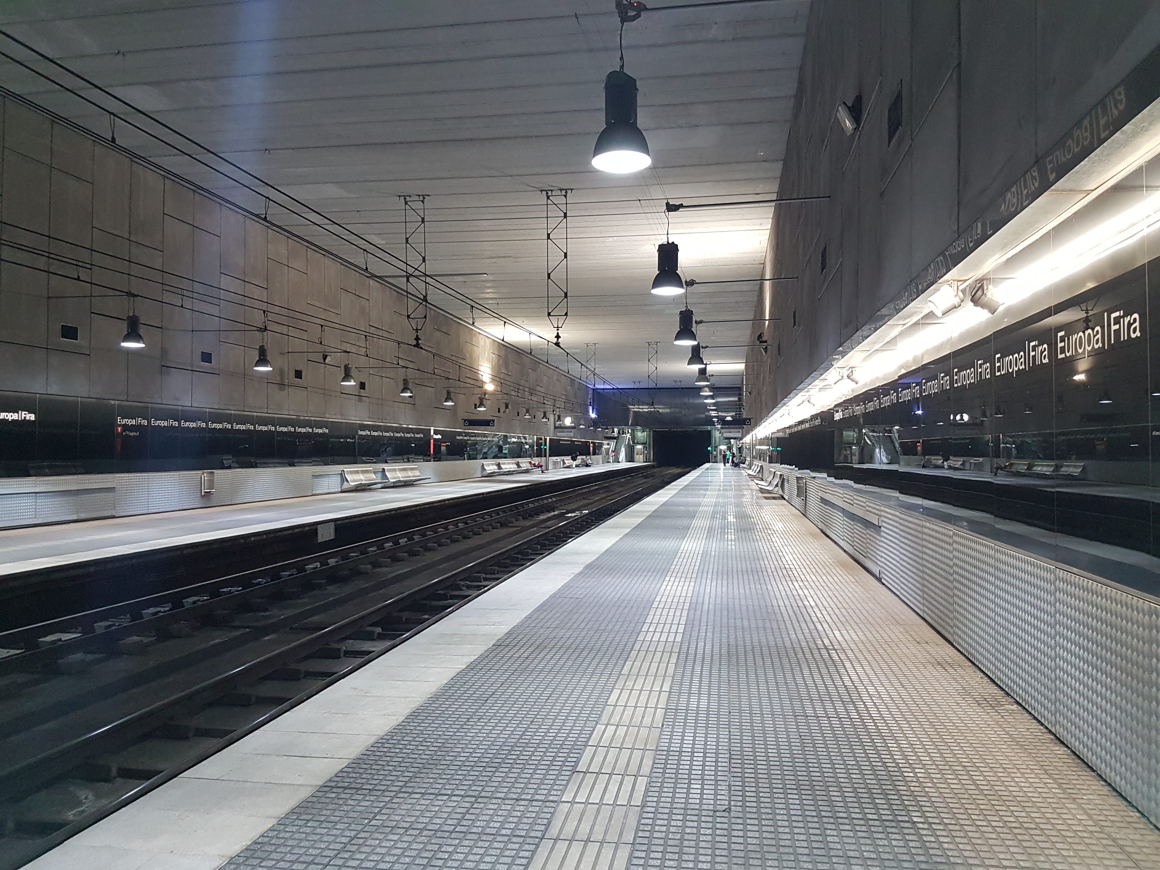 Vista general de l'estació